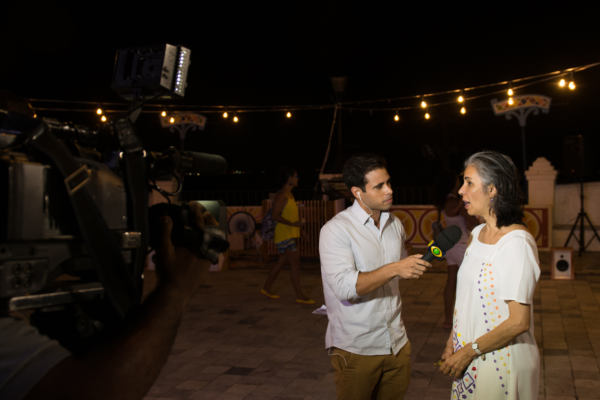 Abertura do Vivadança Festival Internacional 2016 Espetáculo: Looping: Bahia Overdub Felipe de Assis, Leonardo França e Rita Aquino (BA) Mostra Baiana de Dança Contemporânea Data: 20/04/2016 Local: Passeio Público (Salvador) Créditos:Dudu Assunção / Labfoto